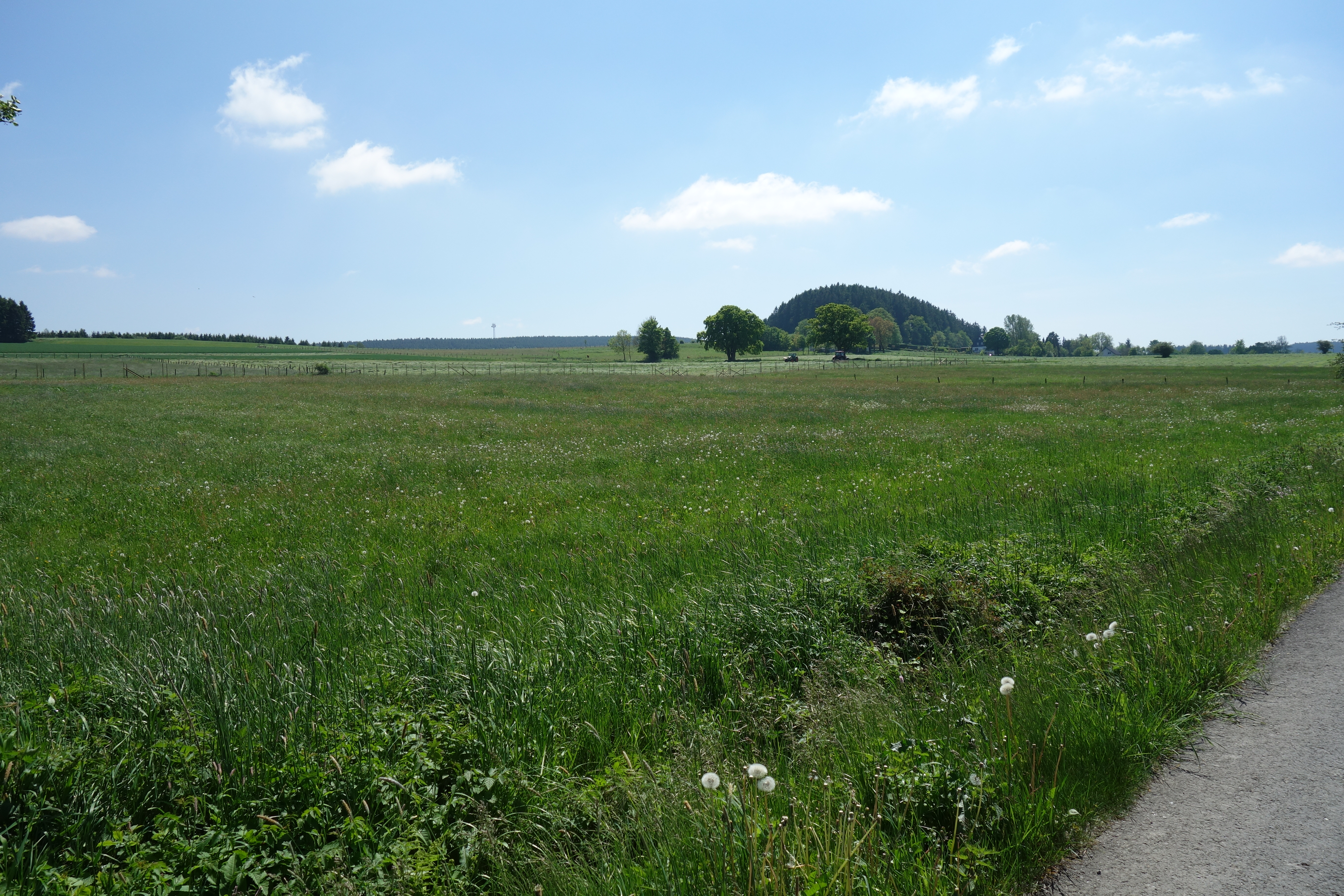 Naturschutzgebiet Brüche Blick von Zentralweg Richtung Südwesten.